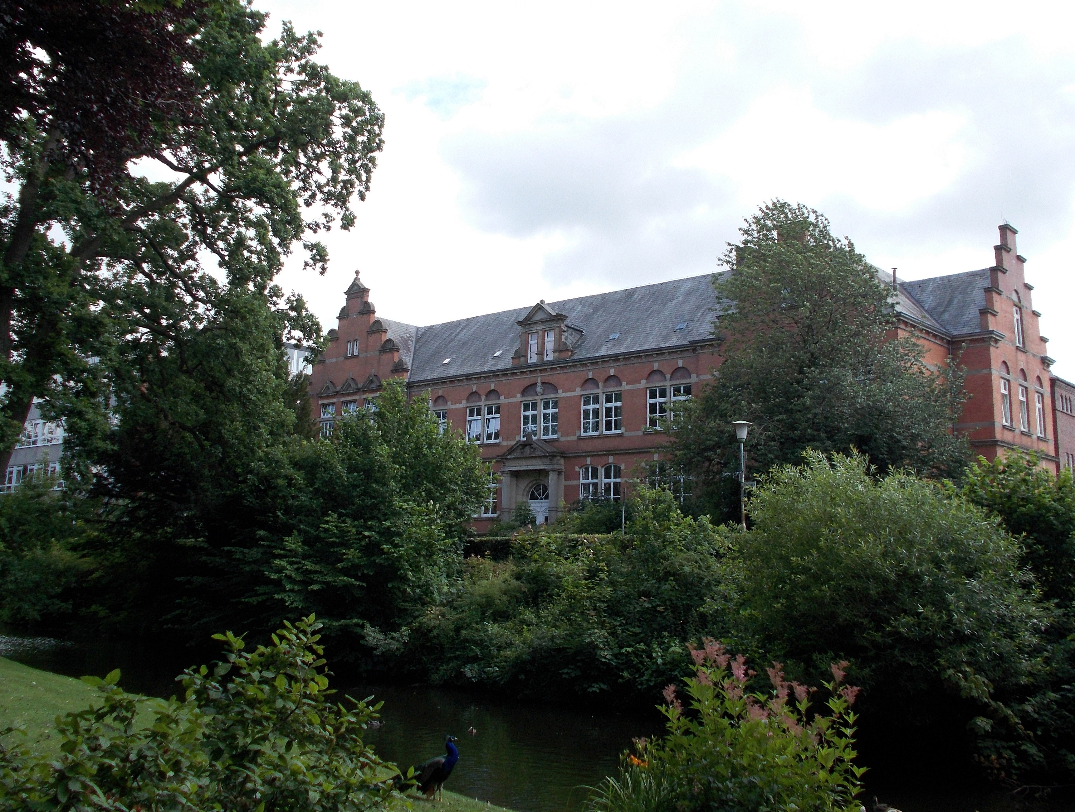 Denkmalgeschütztes Mariengymnasium Jever. Altbau von 1900 mit historischem Eingang. Blick vom Schlosspark